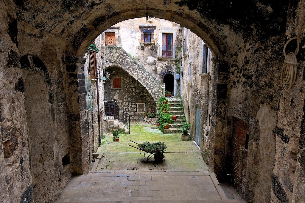 Santo Stefano di Sessanio (provincia dell'Aquila), Abruzzo, Italy